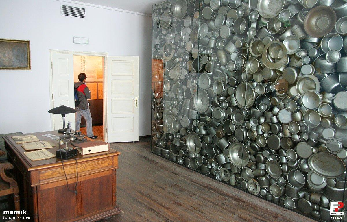 Gabinet Schindlera i instalacja z produktów fabryki, wewnątrz której wypisano nazwiska ocalonych z Listy Schindlera